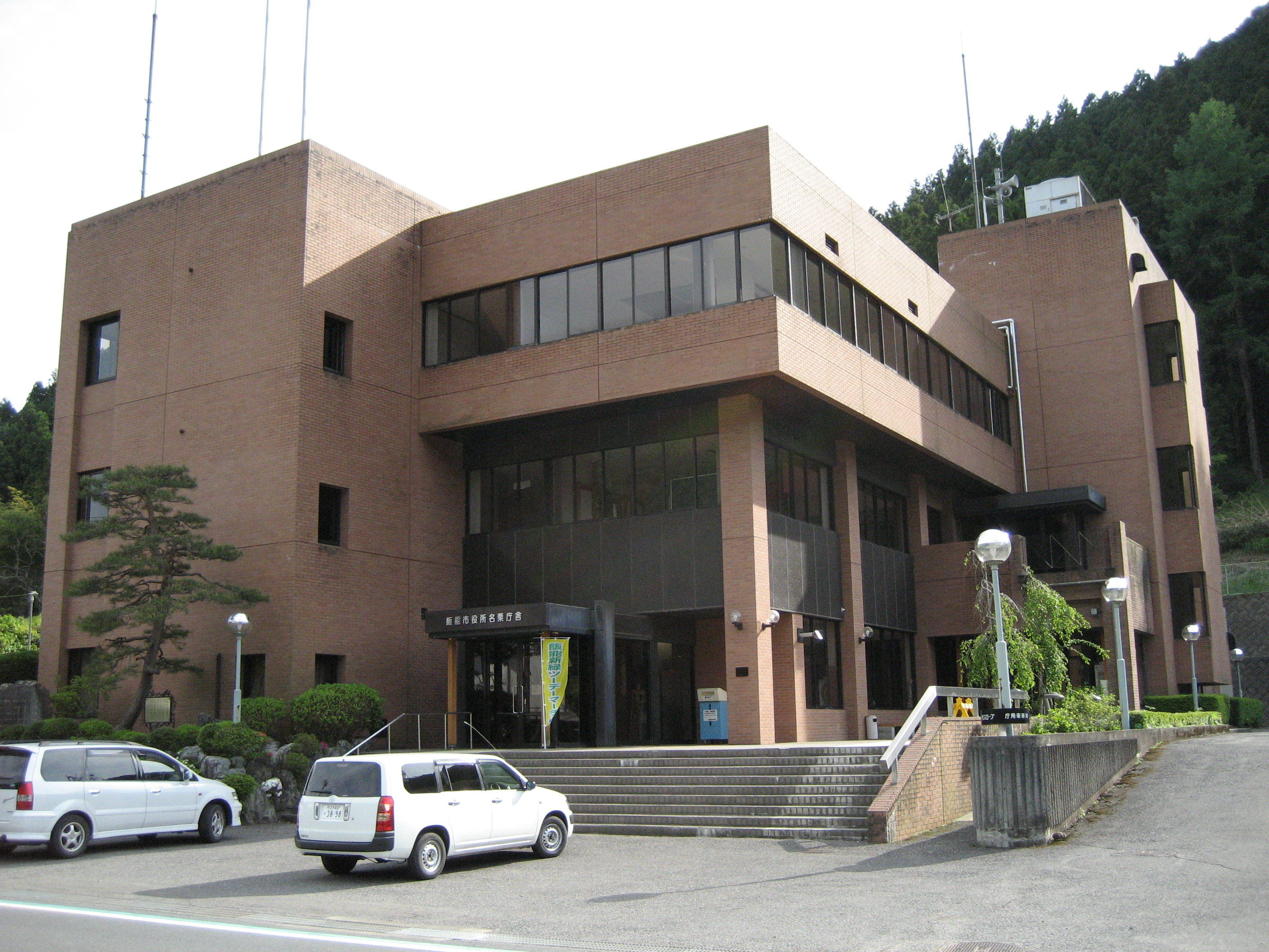 飯能市役所名栗庁舎（旧名栗村役場）